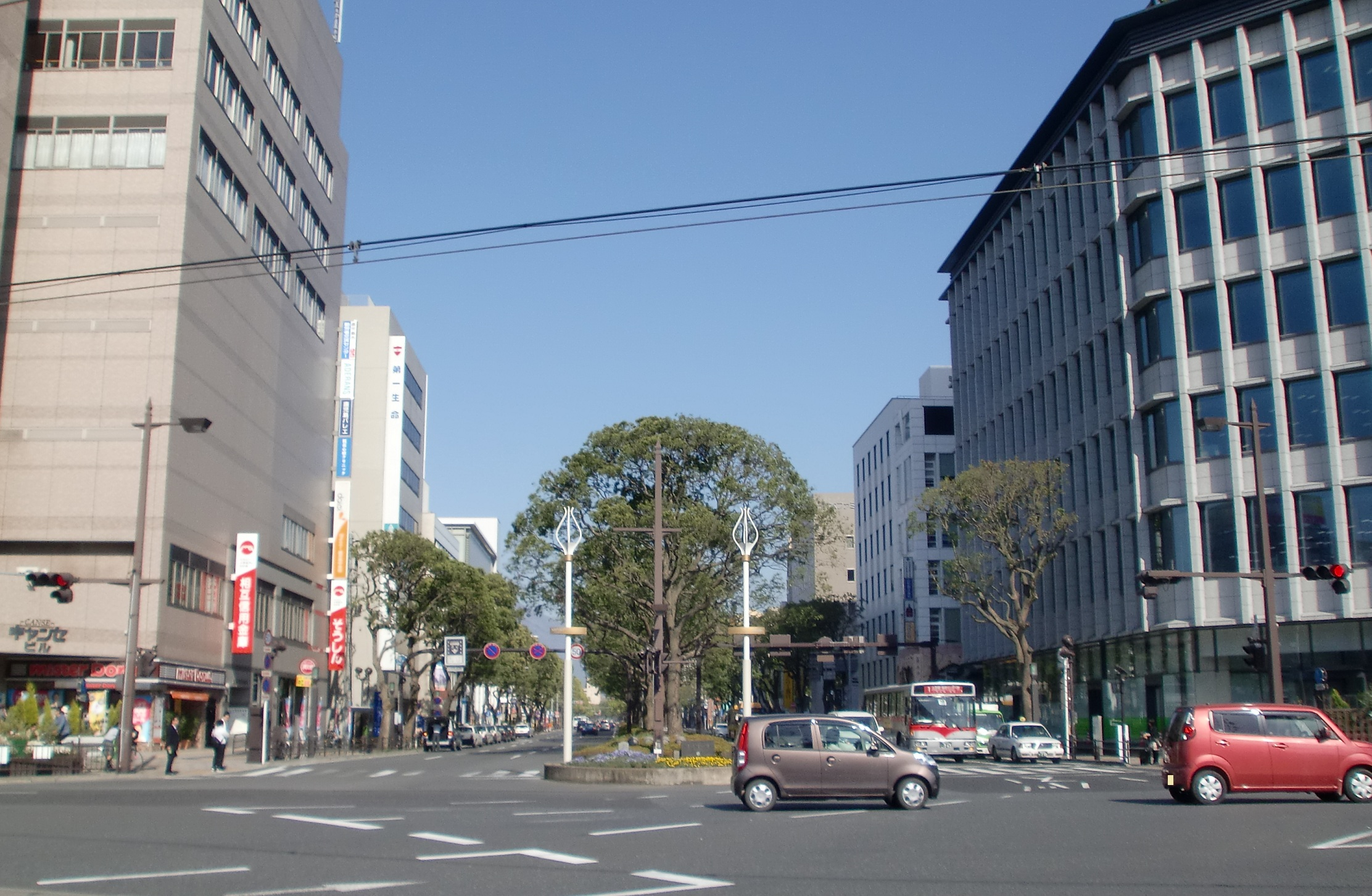 鹿児島県鹿児島市の鹿児島中央駅から新屋敷町に至るナポリ通りを鹿児島中央駅前から新屋敷町側を望む